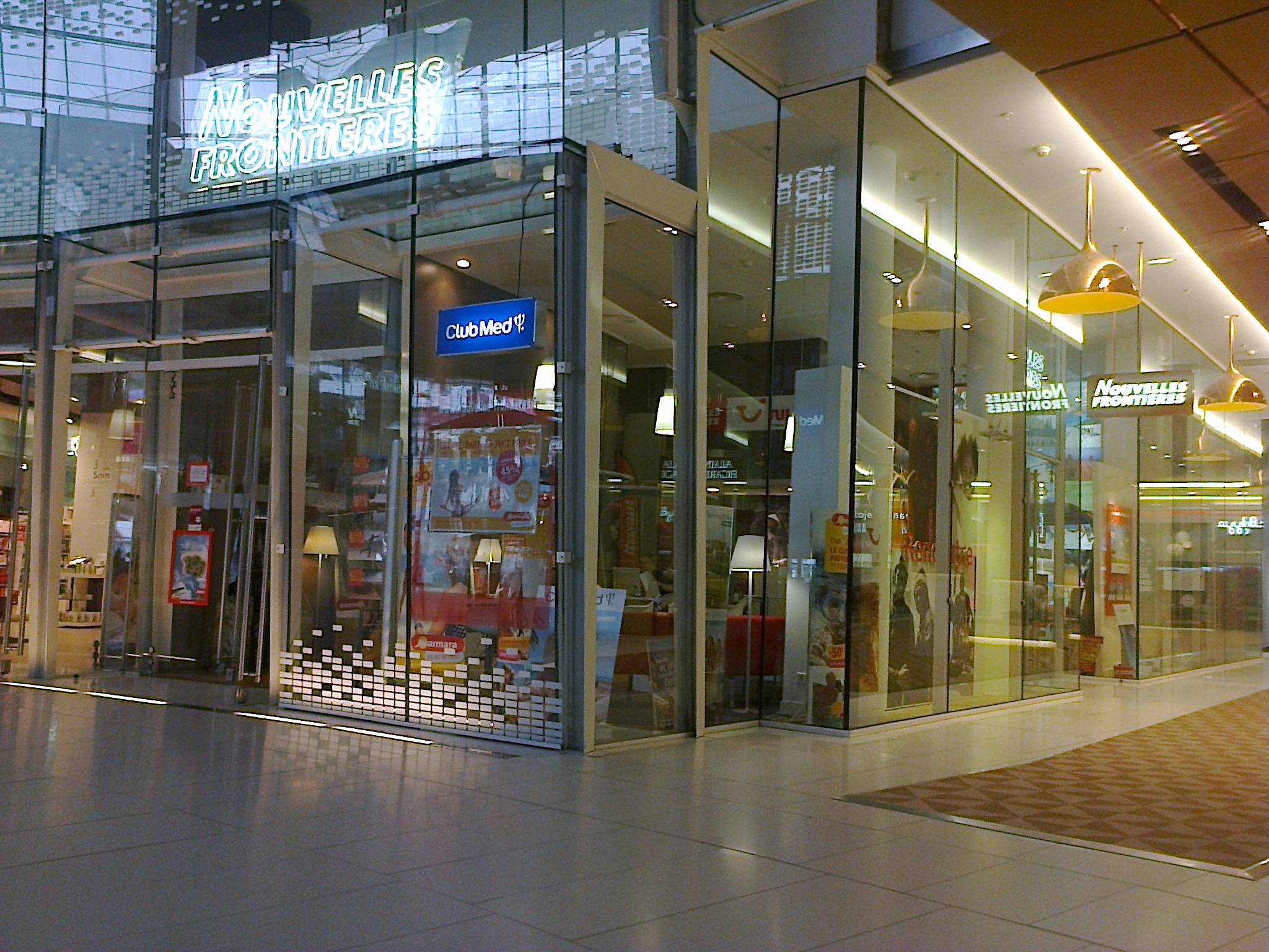 Magasin Nouvelles Frontières au CNIT à La Défense (Hauts-de-Seine)